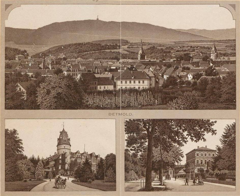 Detmold, Fürstliches Residenzschloss, Promenade mit Palais um 1901